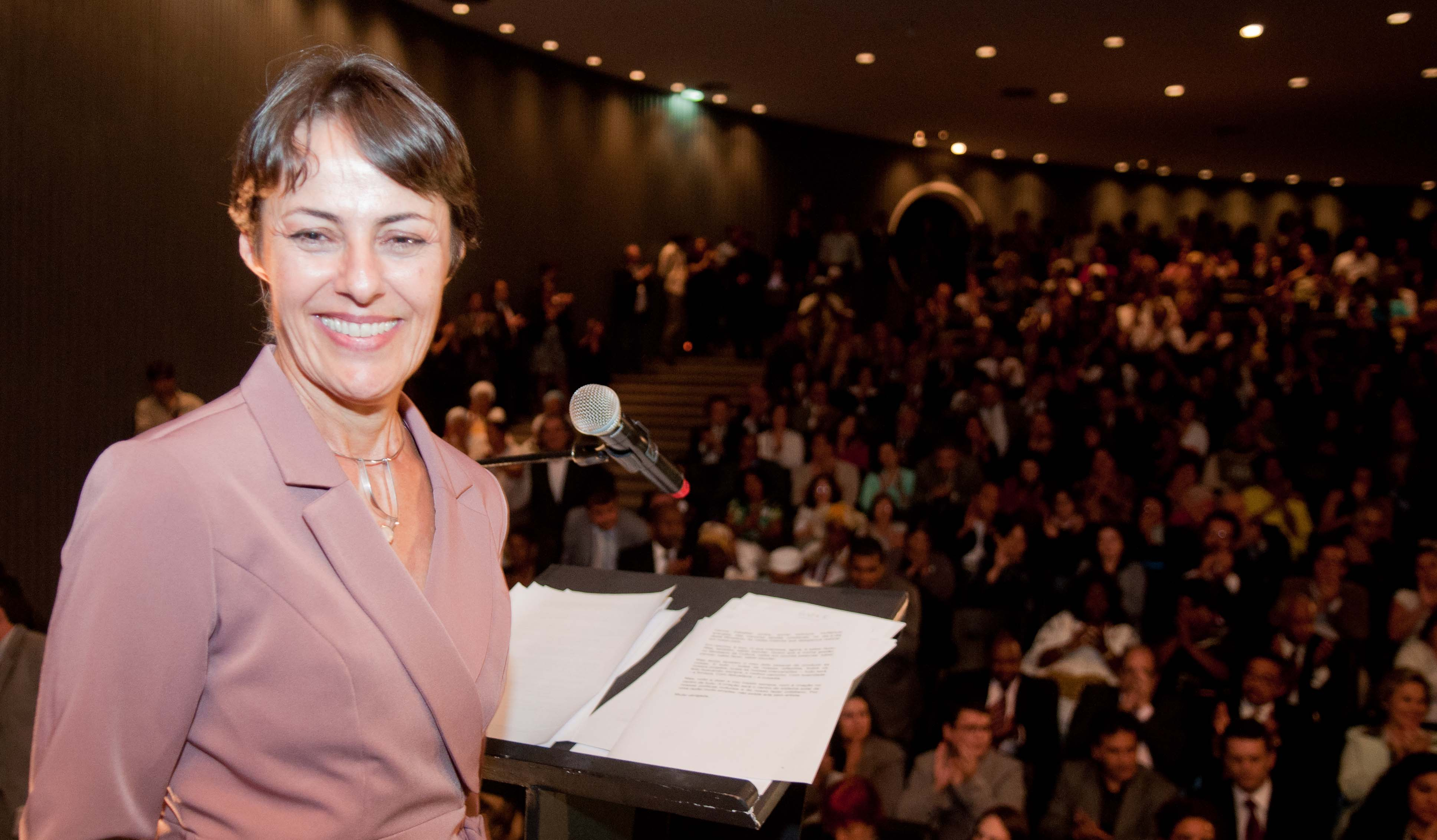 Foto: Pedro França/MinC